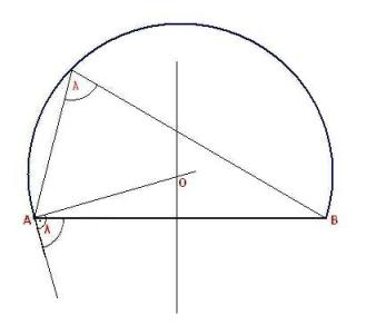 Construcción del arco capaz. Explicaciones en español.